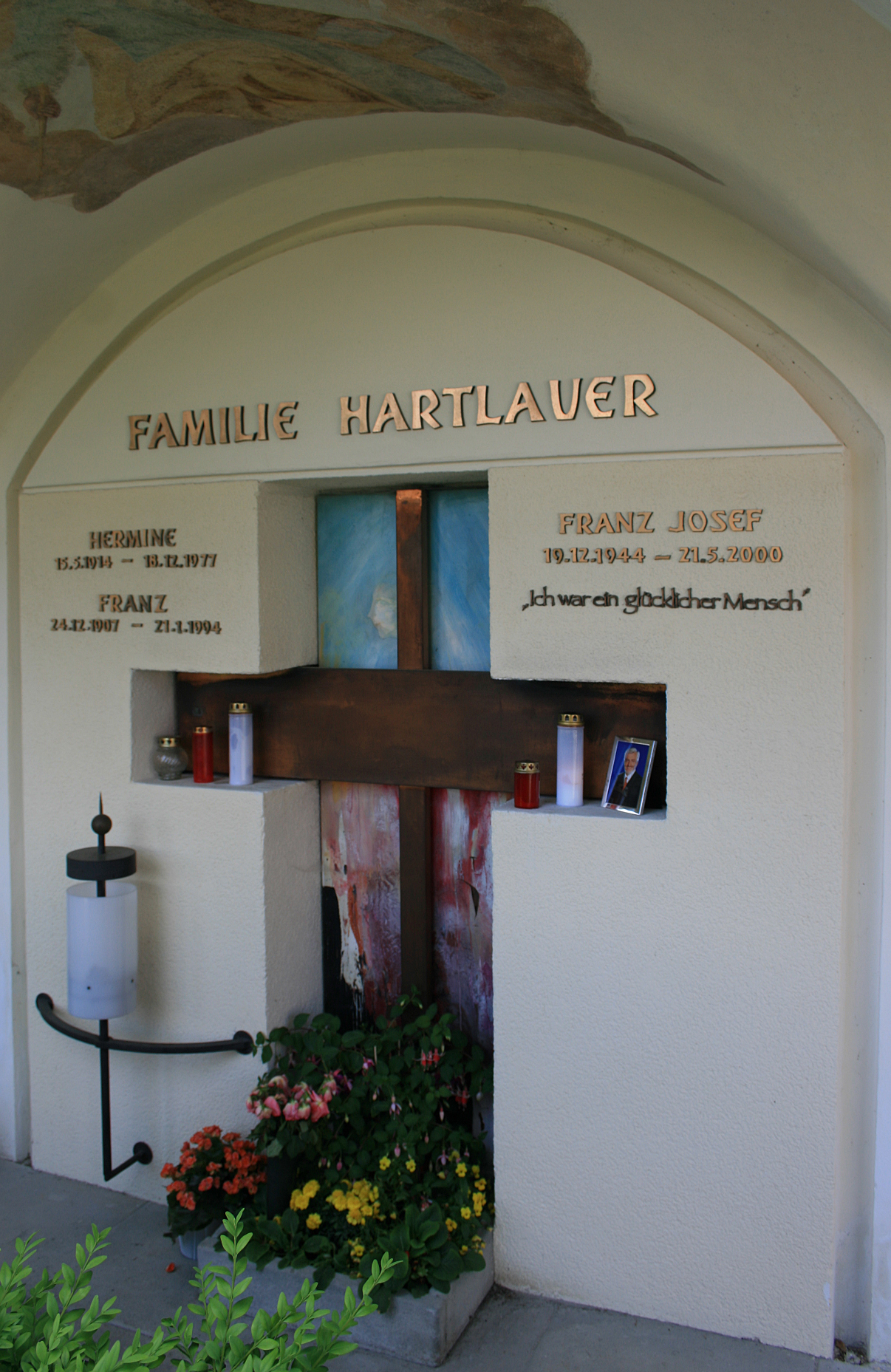 Die Hartlauer Familiengruft in einem Arkadengang des Steyrer Taborfriedhofs